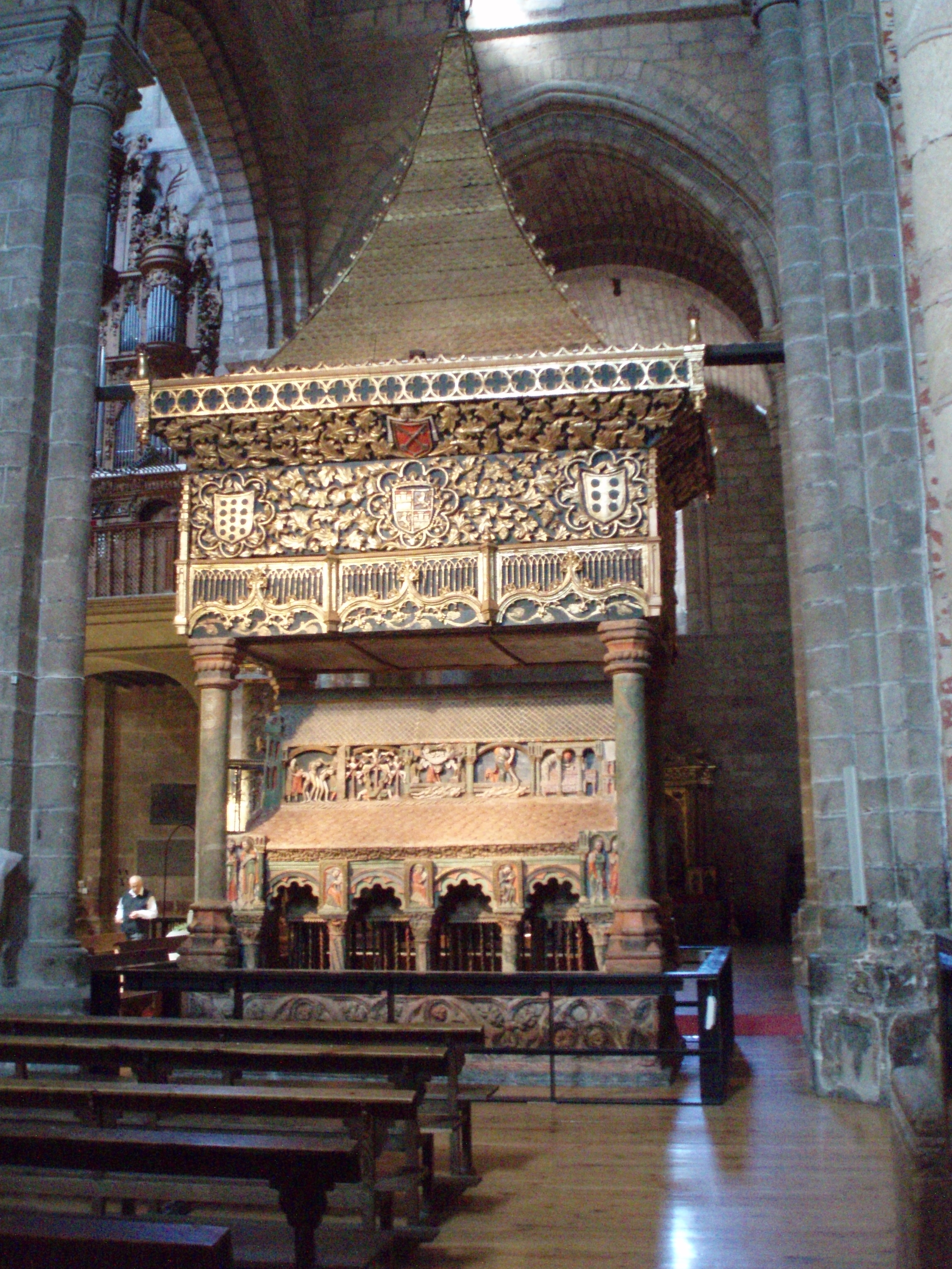 Tumba de los Santos Hermanos Mártires